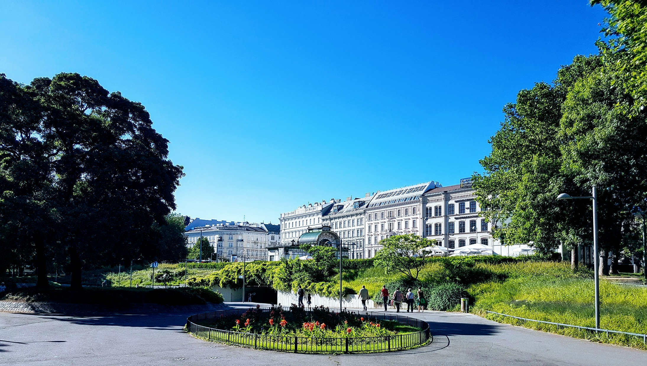 Resselpark